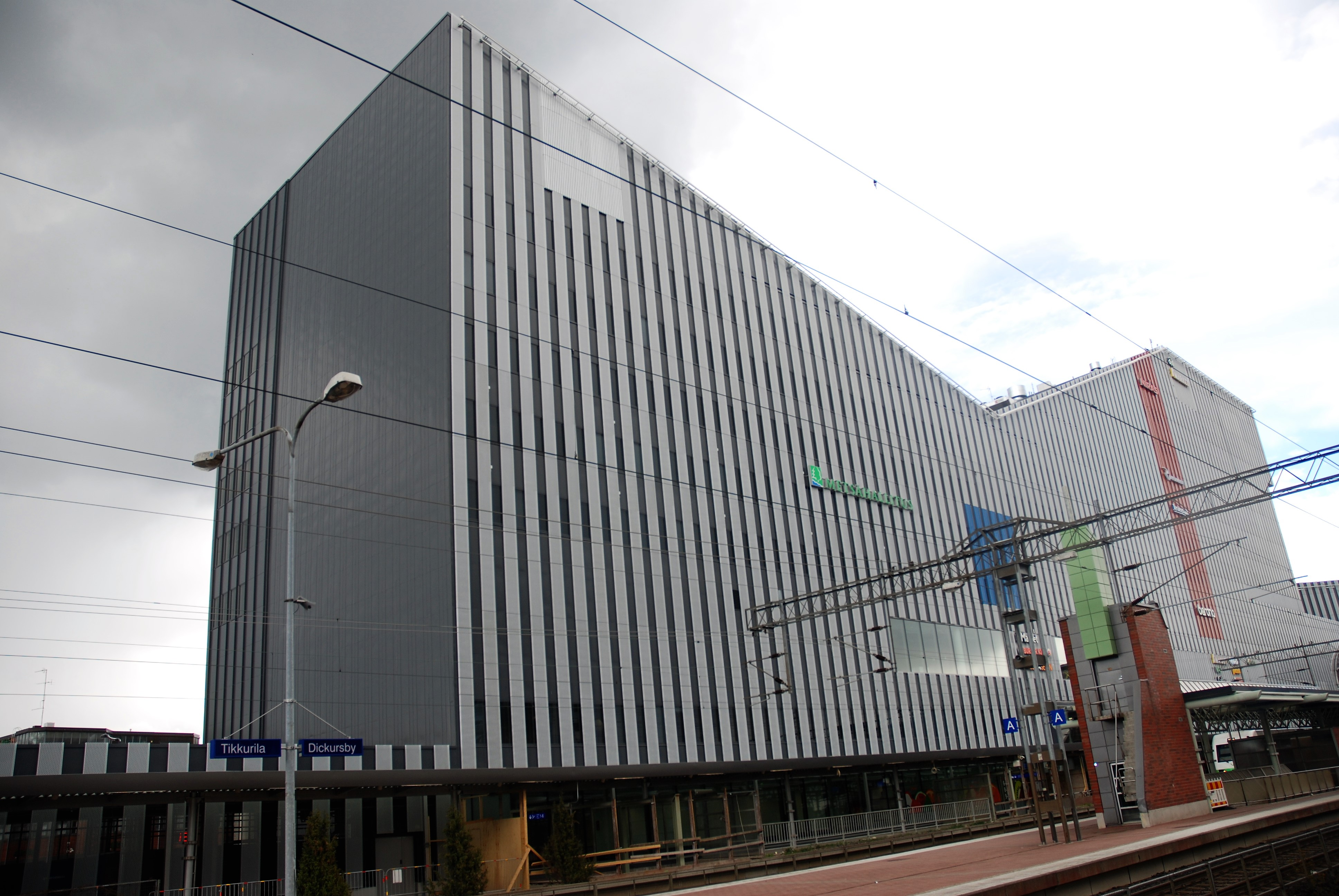 Pääkonttori ja Dixin kauppakeskus juna-asemalta päin